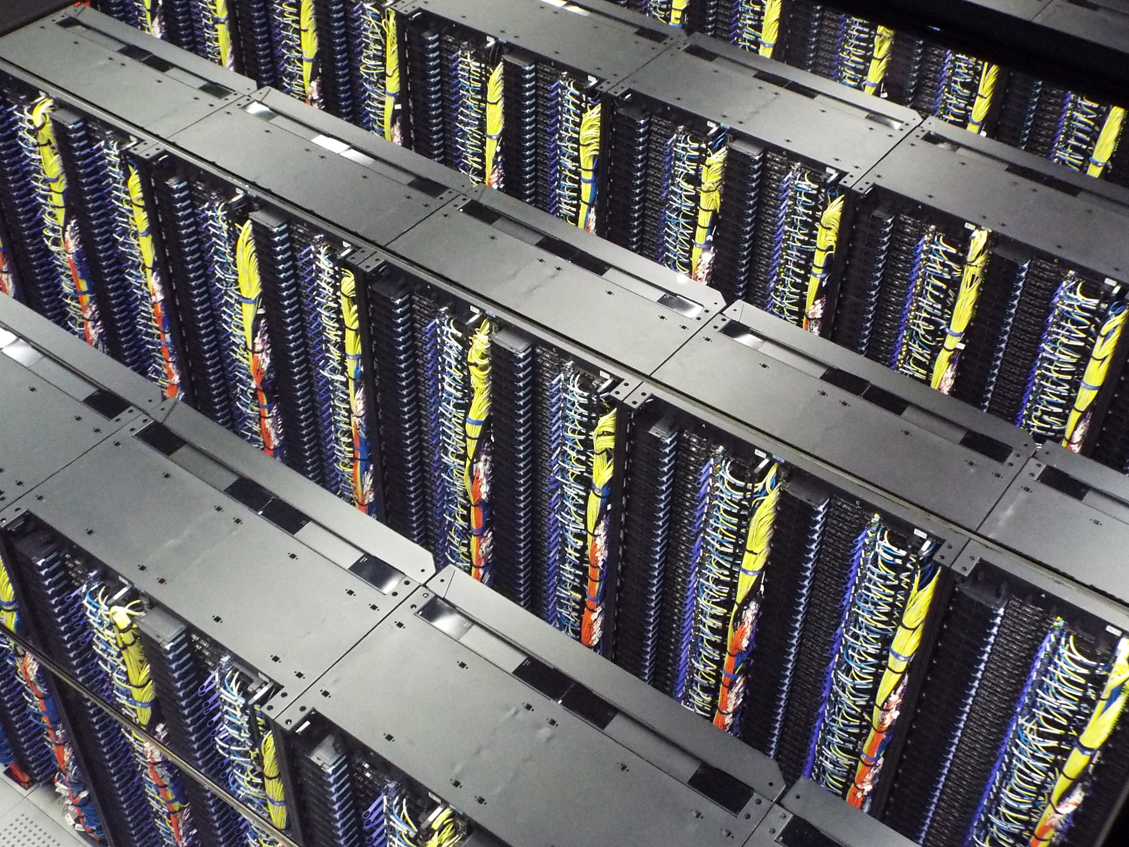 El supercomputador MareNostrum III, situado en la antigua capilla junto a la Torre Girona, en el Barcelona Supercomputing Center-Centro Nacional de Supercomputación, España.